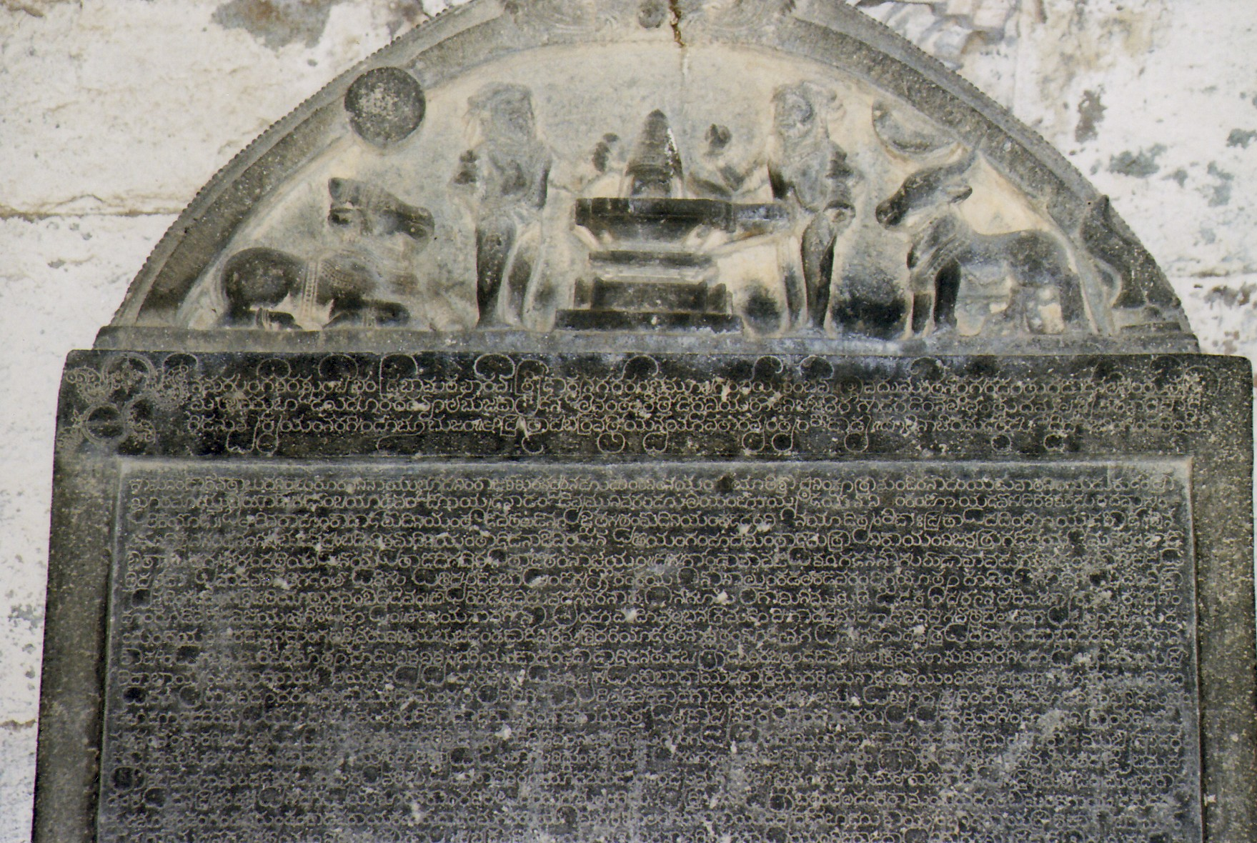 Photographh of old Kannada inscription dated 1234 CE, taken by me at the Mallikarjuna temple in Basaral (also spelt Basaralu), Mandya district, Karnataka state, India in June 2006 - Dineshkannambadi